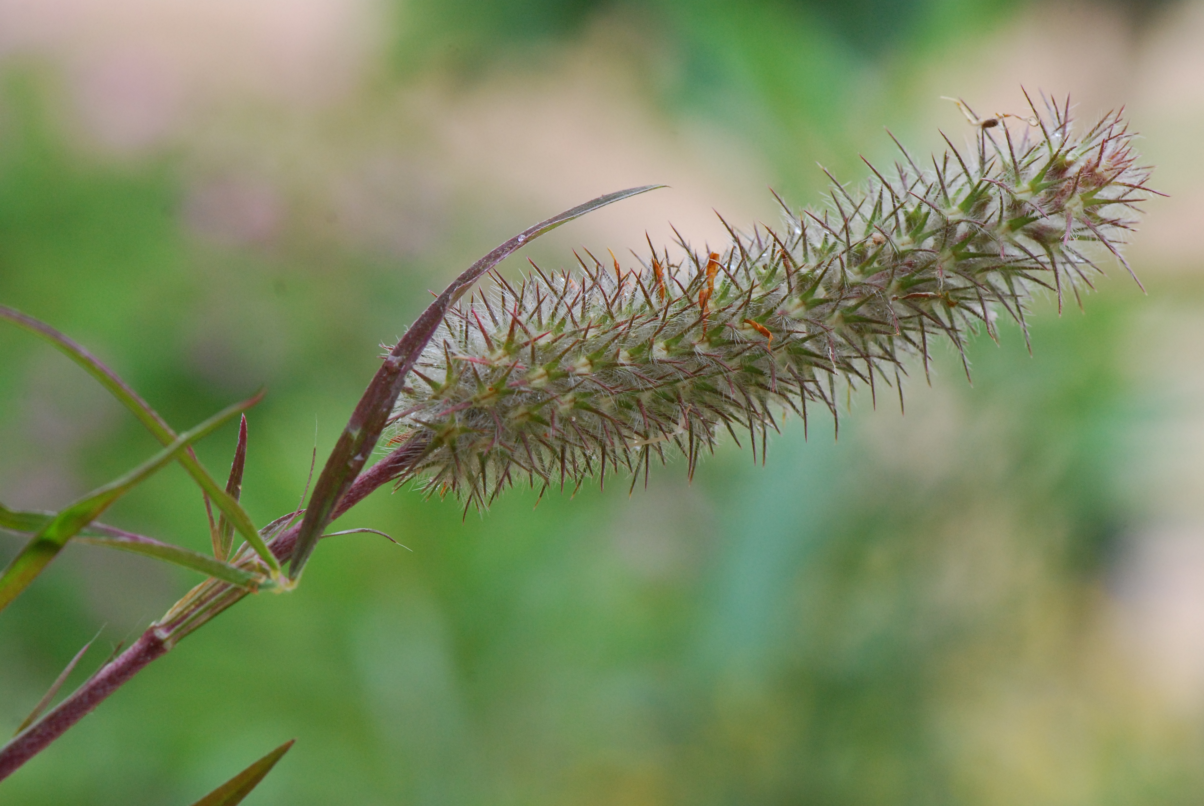 Trifolium angusfifolium, trèfle à feuilles étroites, Corse